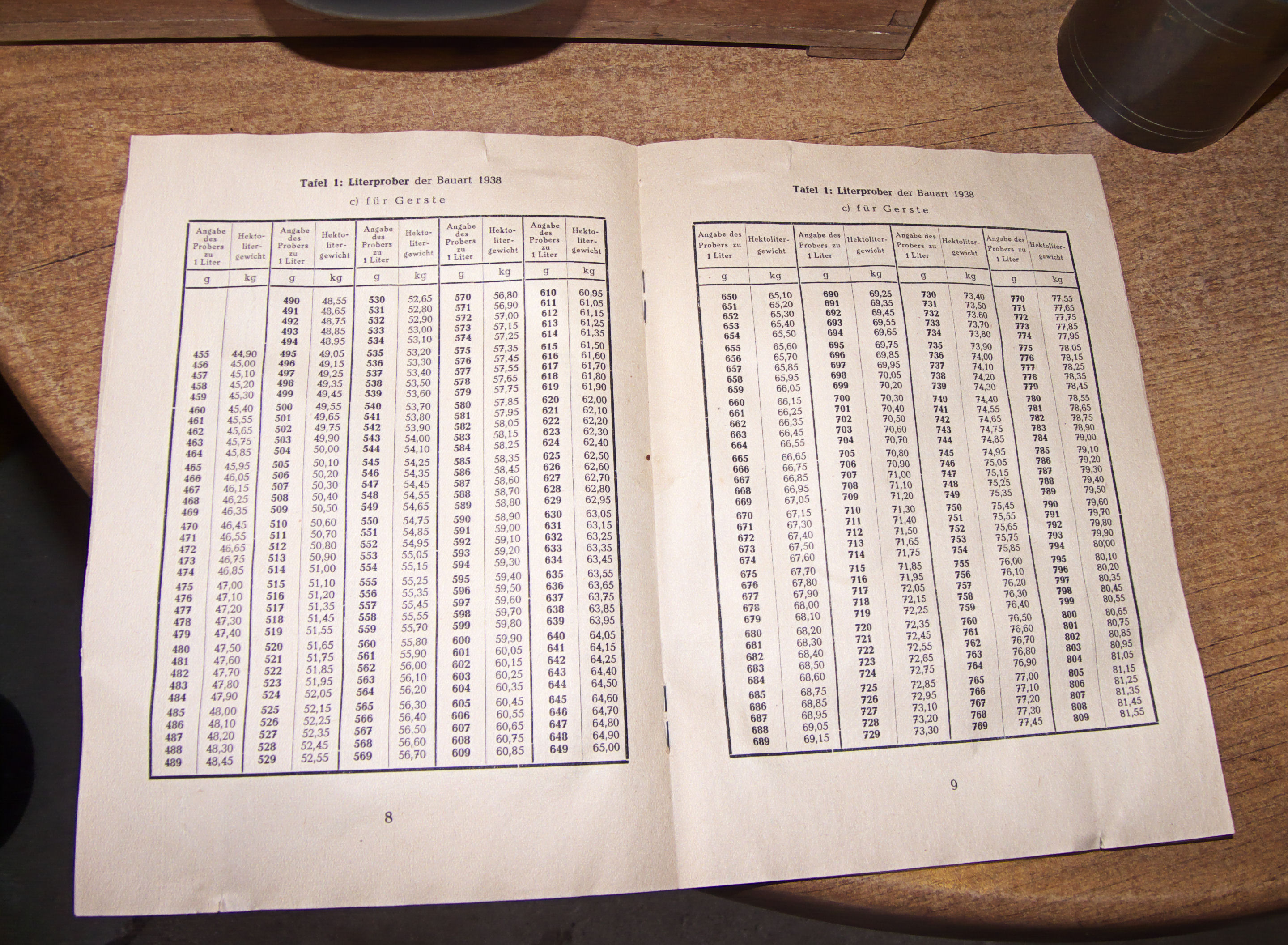 Spoordonkse Watermolen, bepaling hectolitergewicht